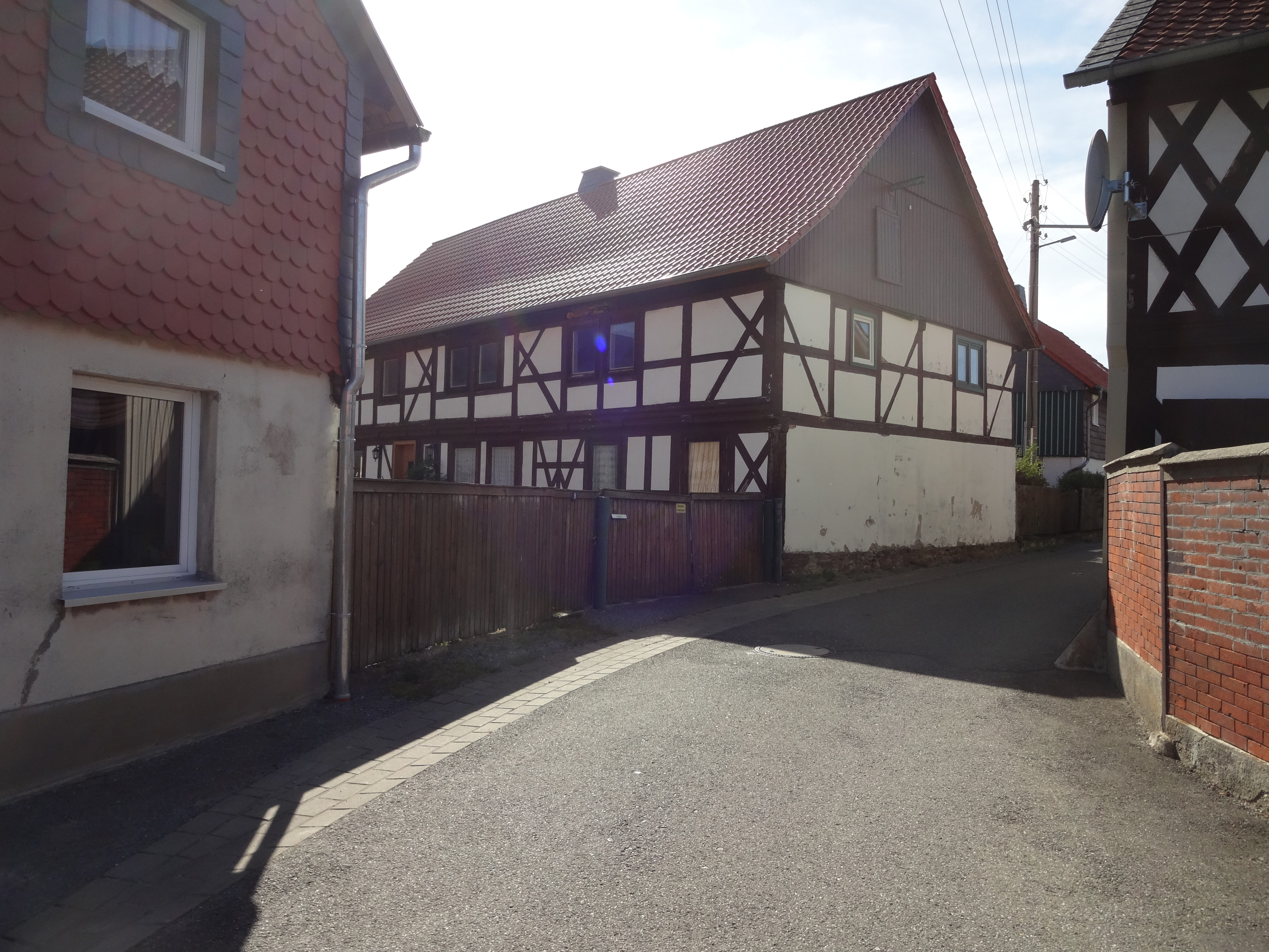 denkmalgeschütztes Wohnhaus in der Backhausgasse 8 in Drübeck